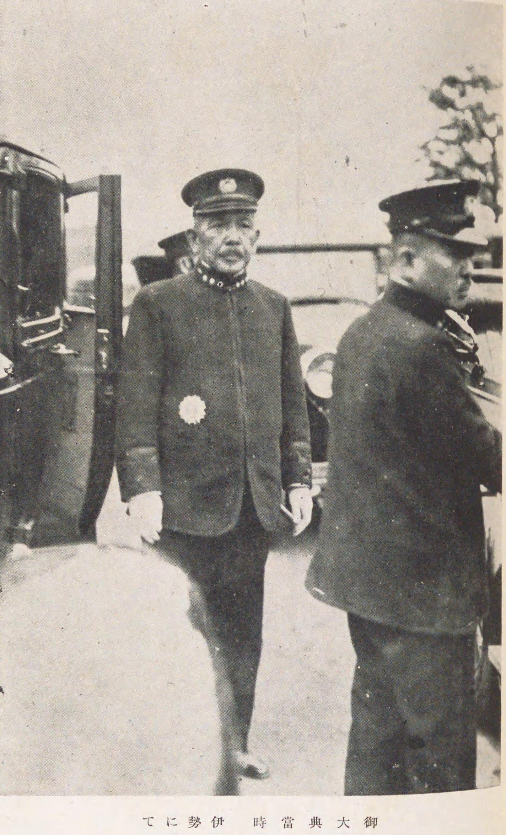 1928年昭和天皇即位の礼での内務大臣望月圭介。伊勢神宮にて。